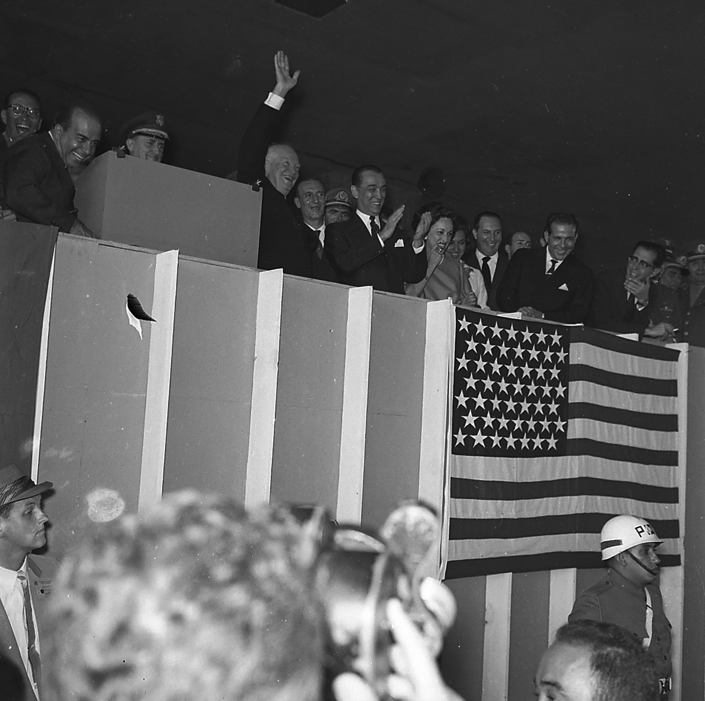 Imagem do Fundo Agência Nacional, do Arquivo Nacional